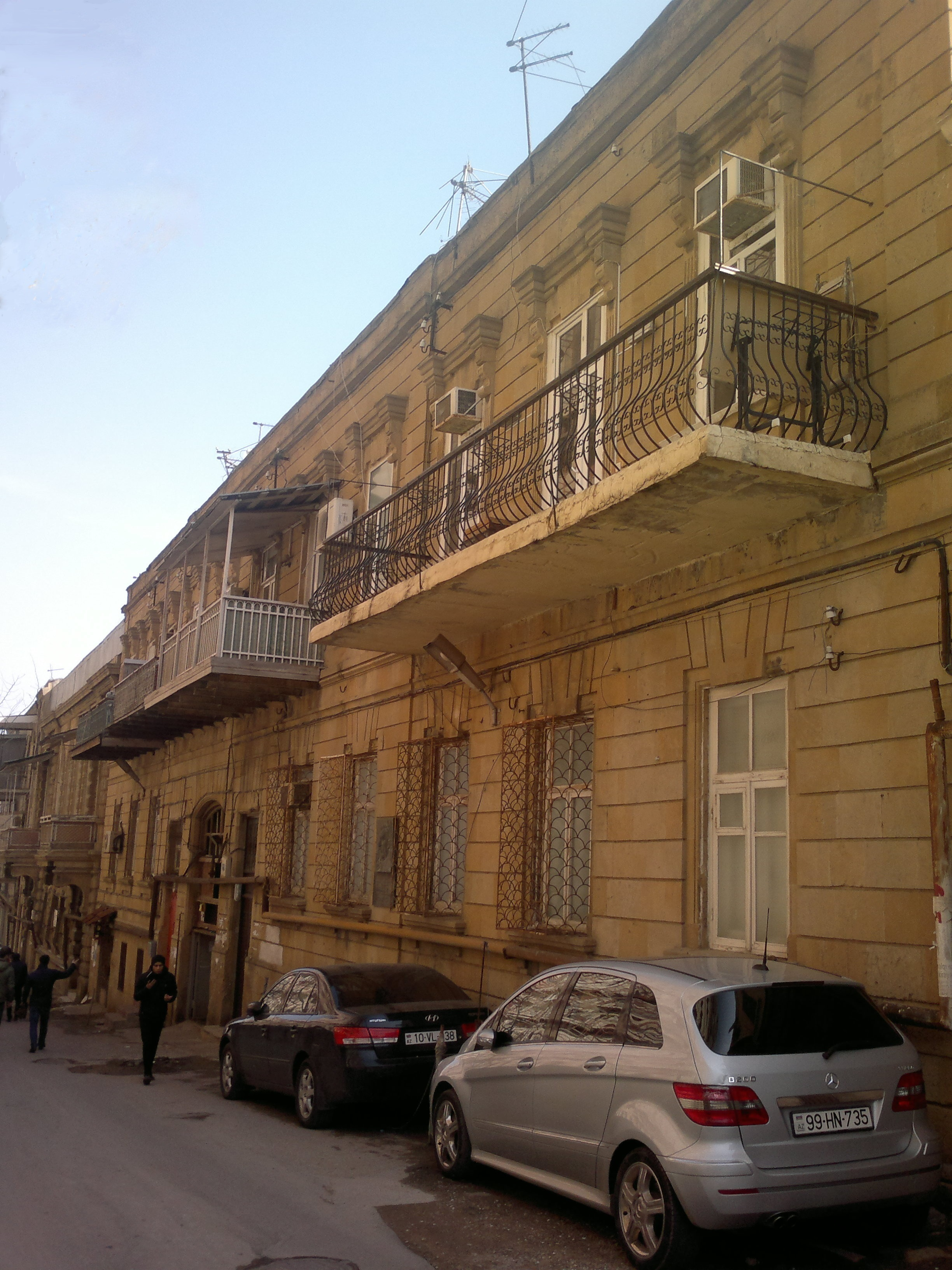 Building on Suleyman Taghizade Street 68